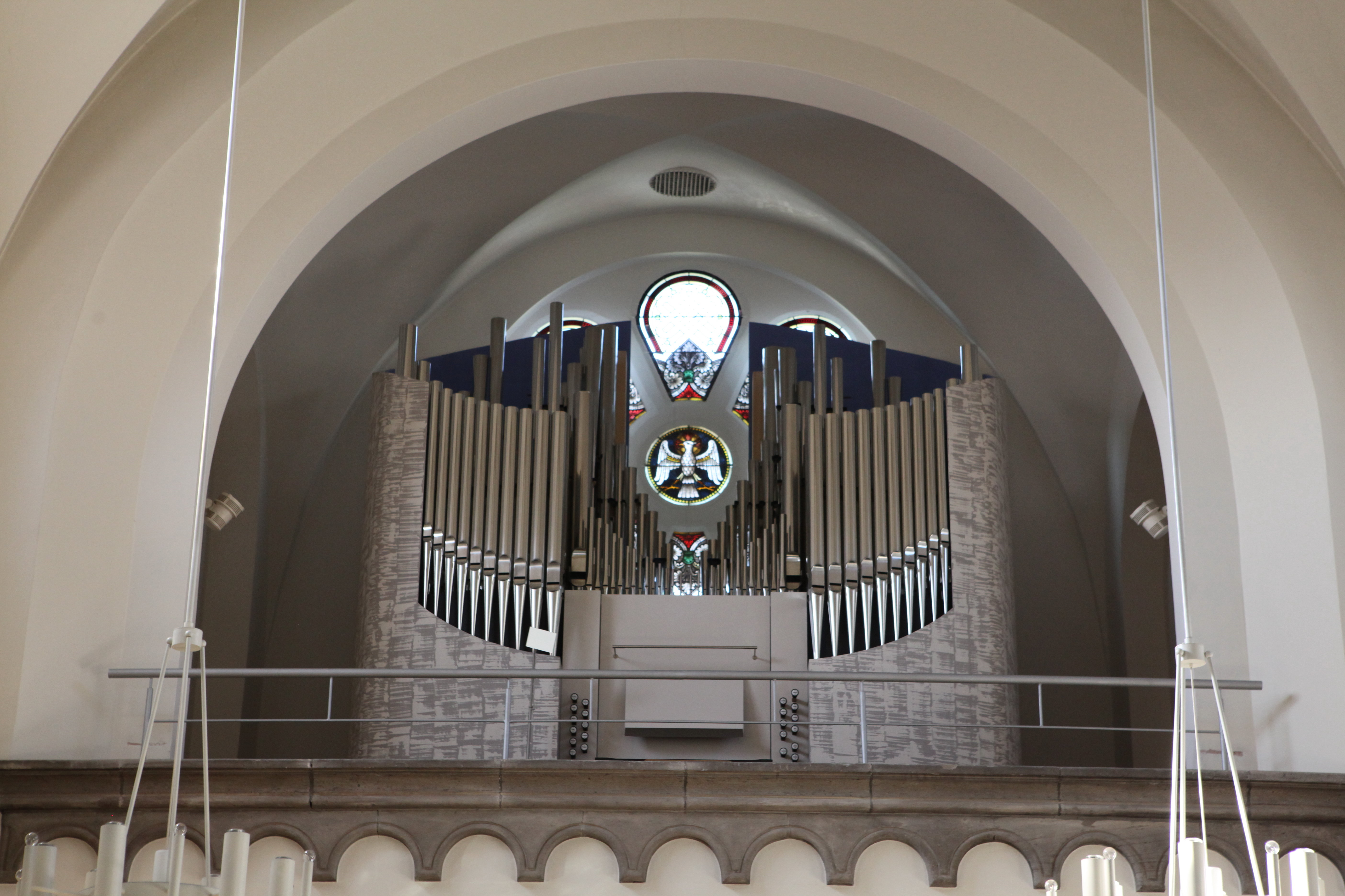 Sonneberg St. Stefan